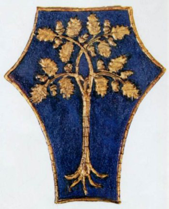 Ligure: Stemma della Rovere di Savona Copyright (c) 2000 Dario Ferro.